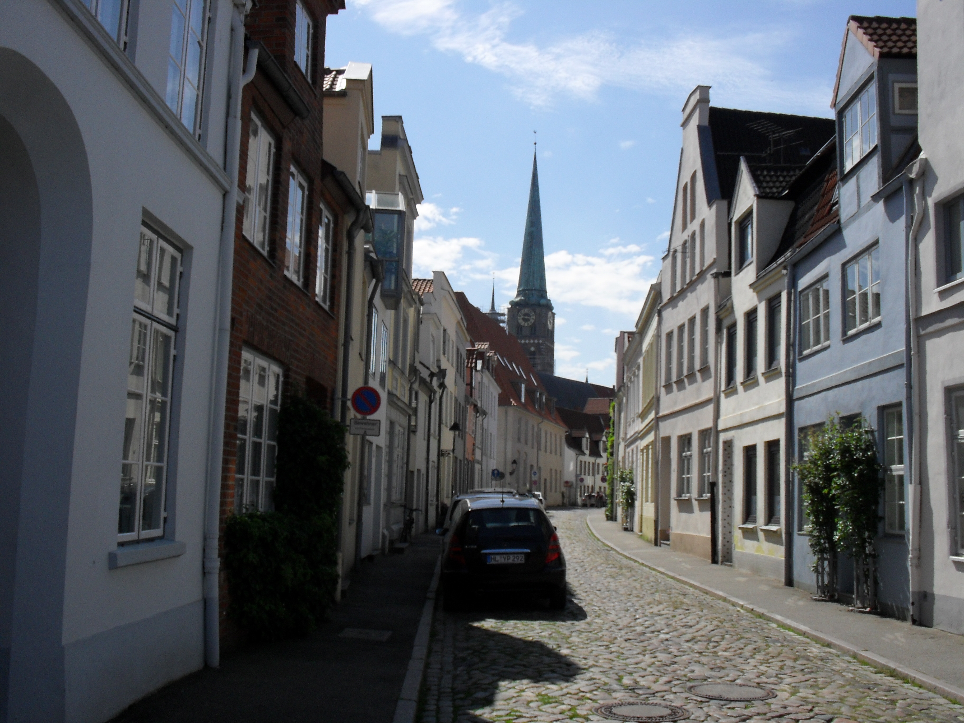 Die Große Gröpelgrube in Lübeck